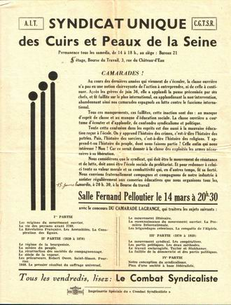 Fac-similé d'un appel à une causerie à la Bourse du Travail le 14 mars 1939